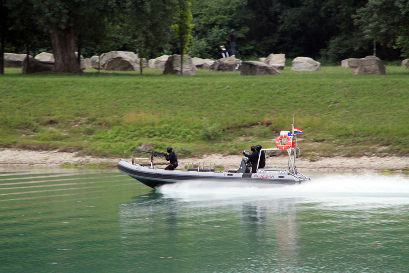 Dan OSRH